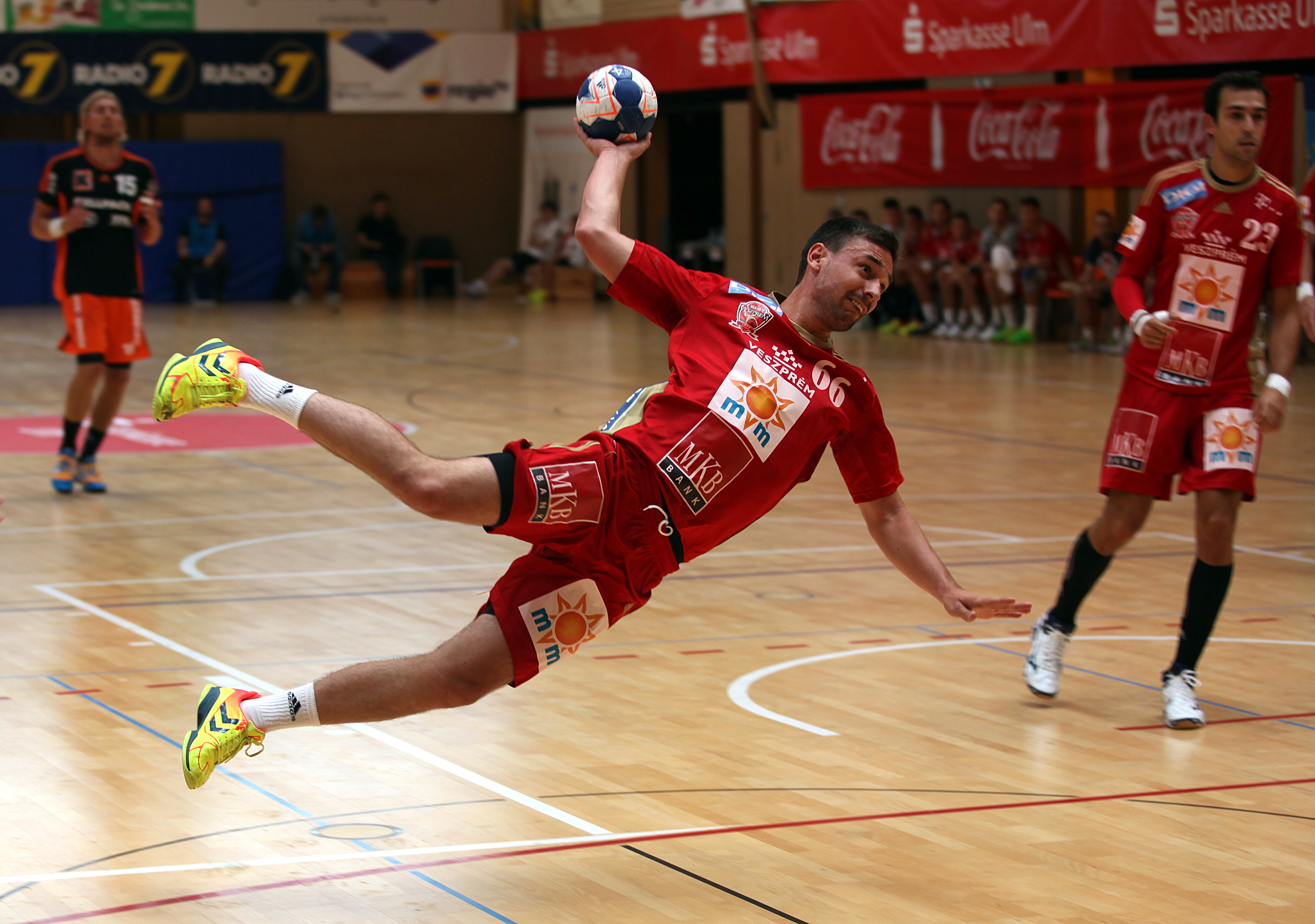 Máté Lékai, Handballspieler von KC Veszprém am 16. August 2014 beim Sparkassen-Cup in Ehingen.